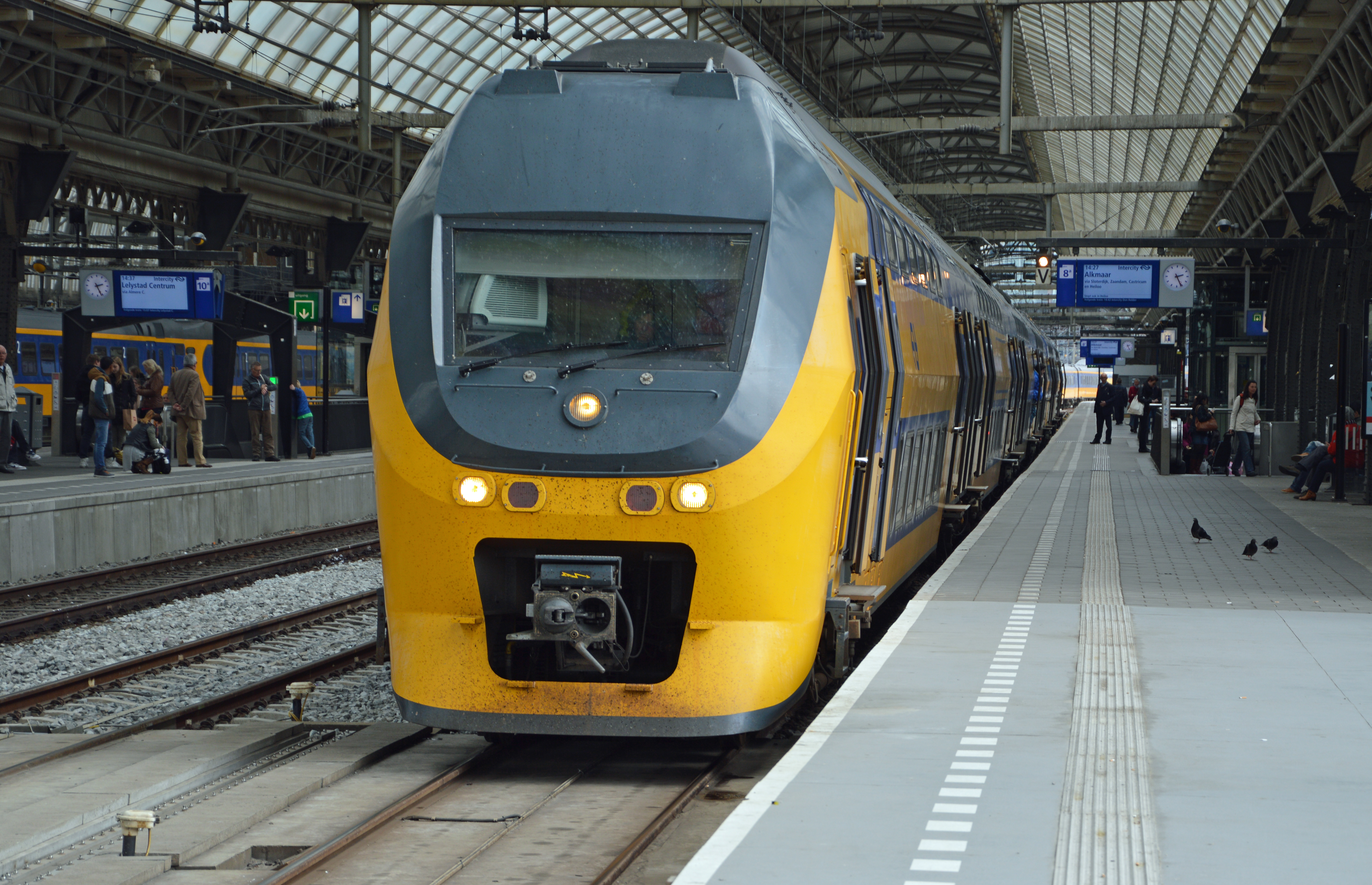 Even een wisseling van machinist en conducteur en dan verder naar Alkmaar.